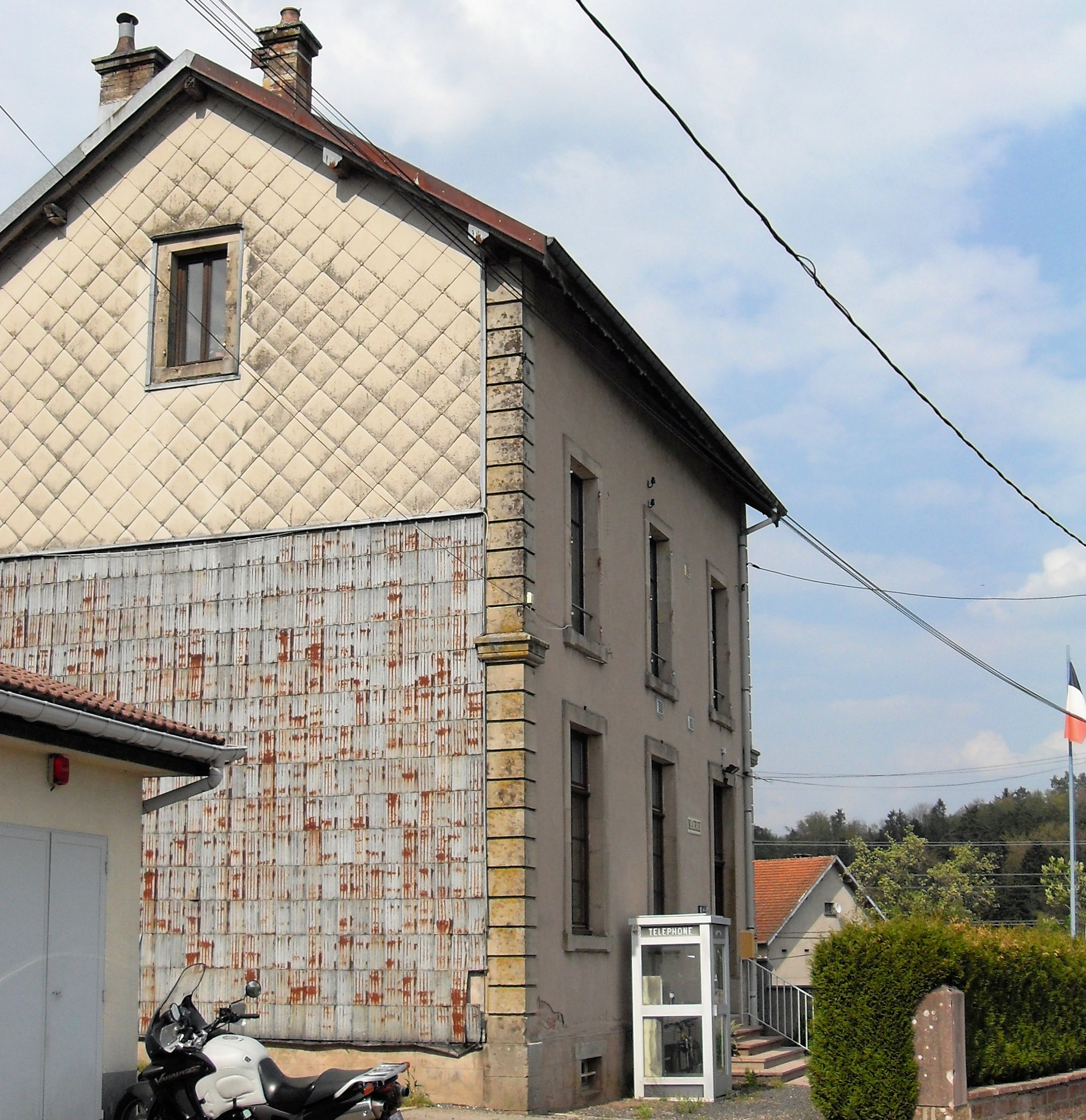 La mairie de Vervezelle